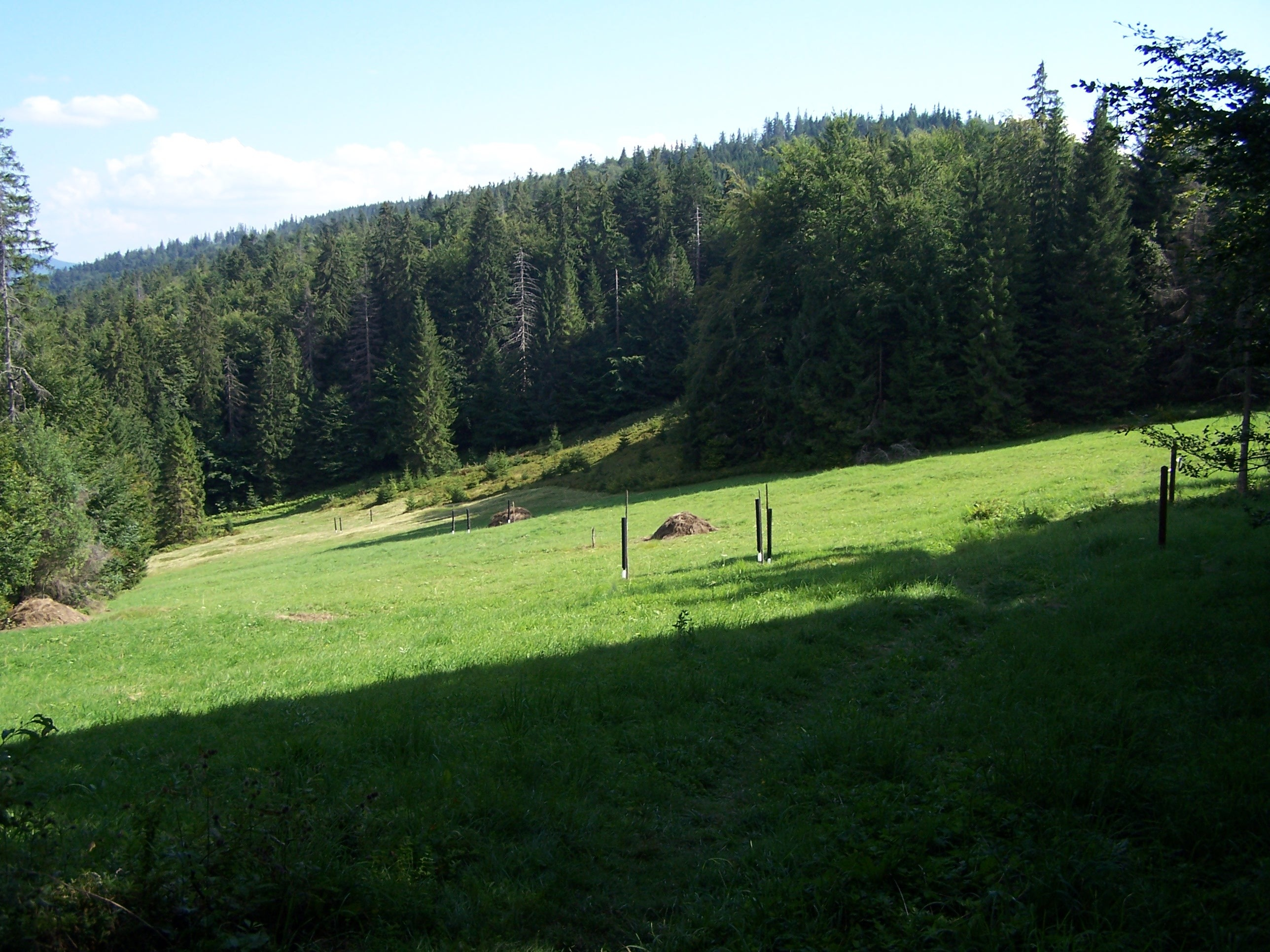 Polana Tomaśkula w Gorcach